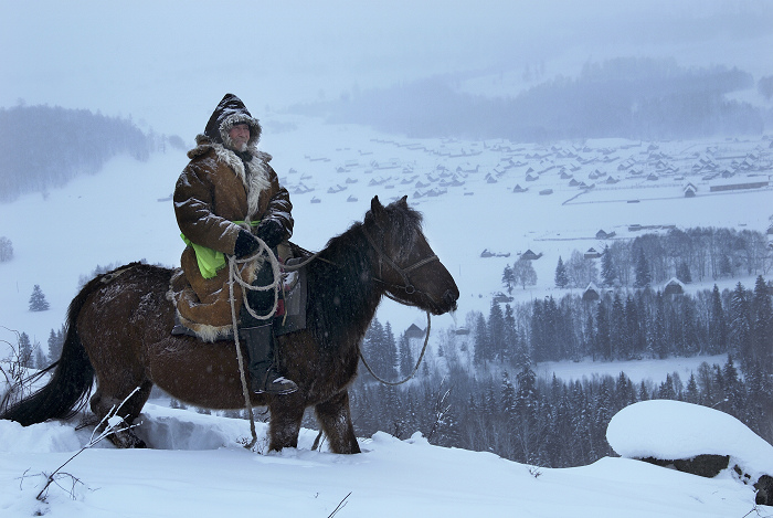 最后的图瓦人